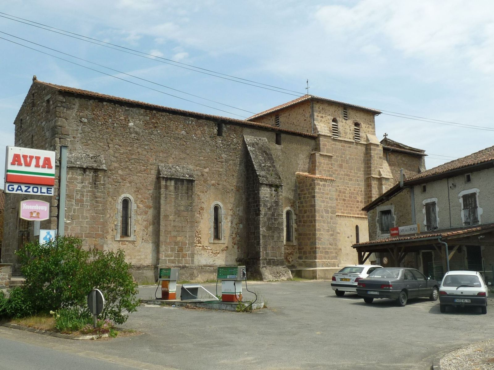 Eglise de Chabrac, Charente, France